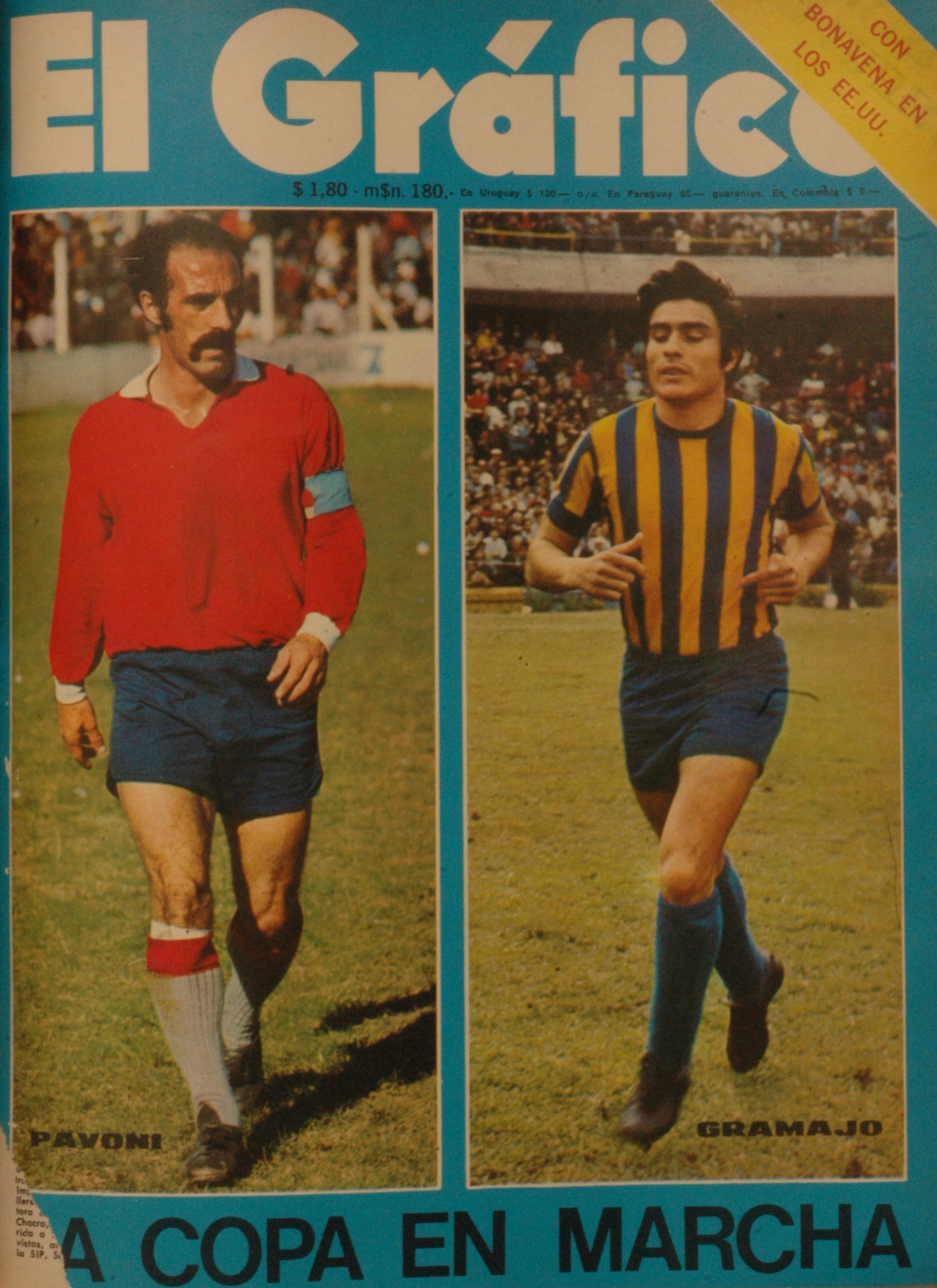 El Grafico del 15 de Febrero de 1972. Edicion 2732